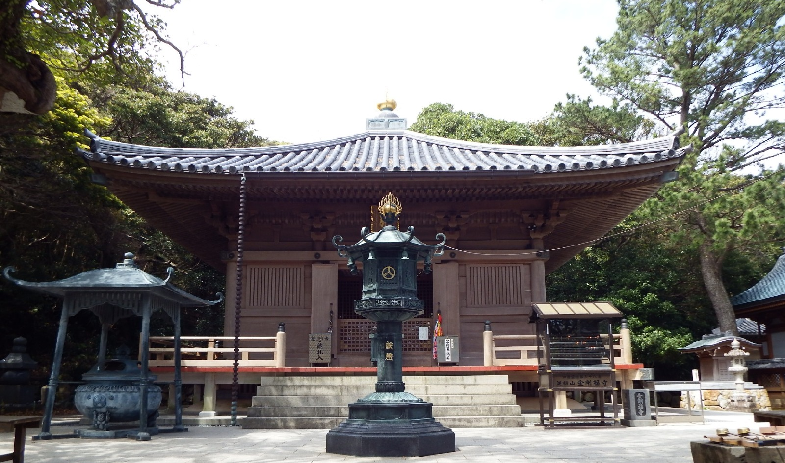 金剛福寺の大師堂